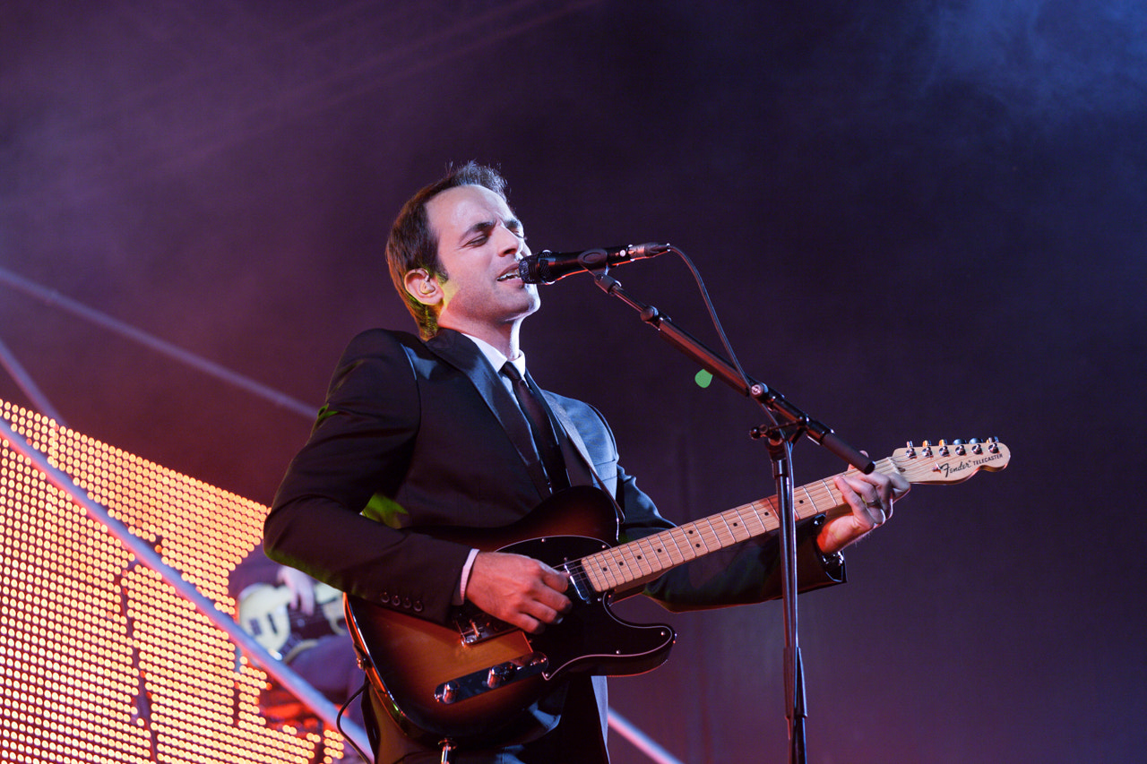 500px provided description: Andre Sardet I [#light ,#music ,#live ,#smoke ,#portugal ,#coimbra ,#andre ,#lousa ,#sardet ,#sao joao]